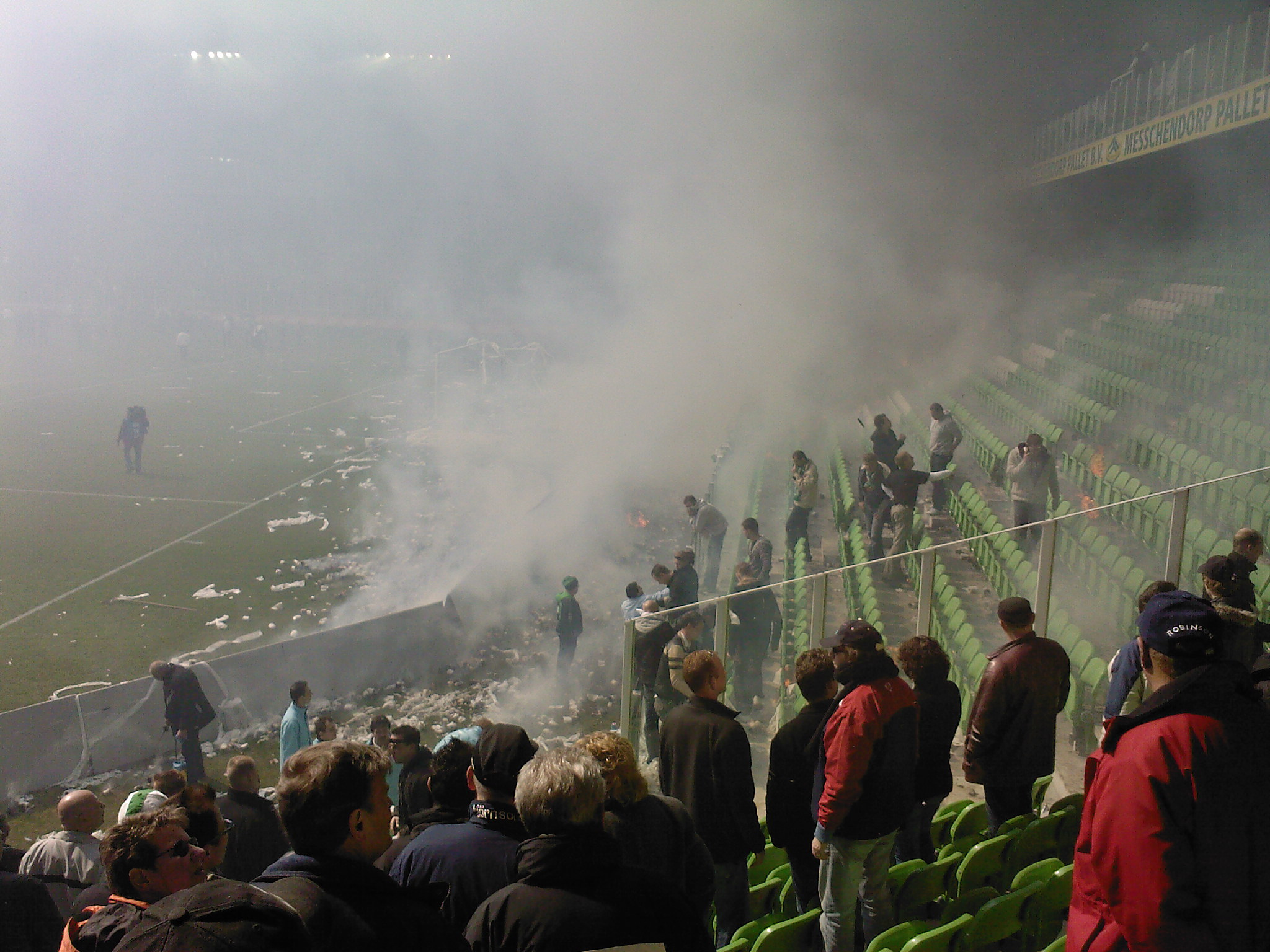 Euroborg fire FC Groningen - Ajax